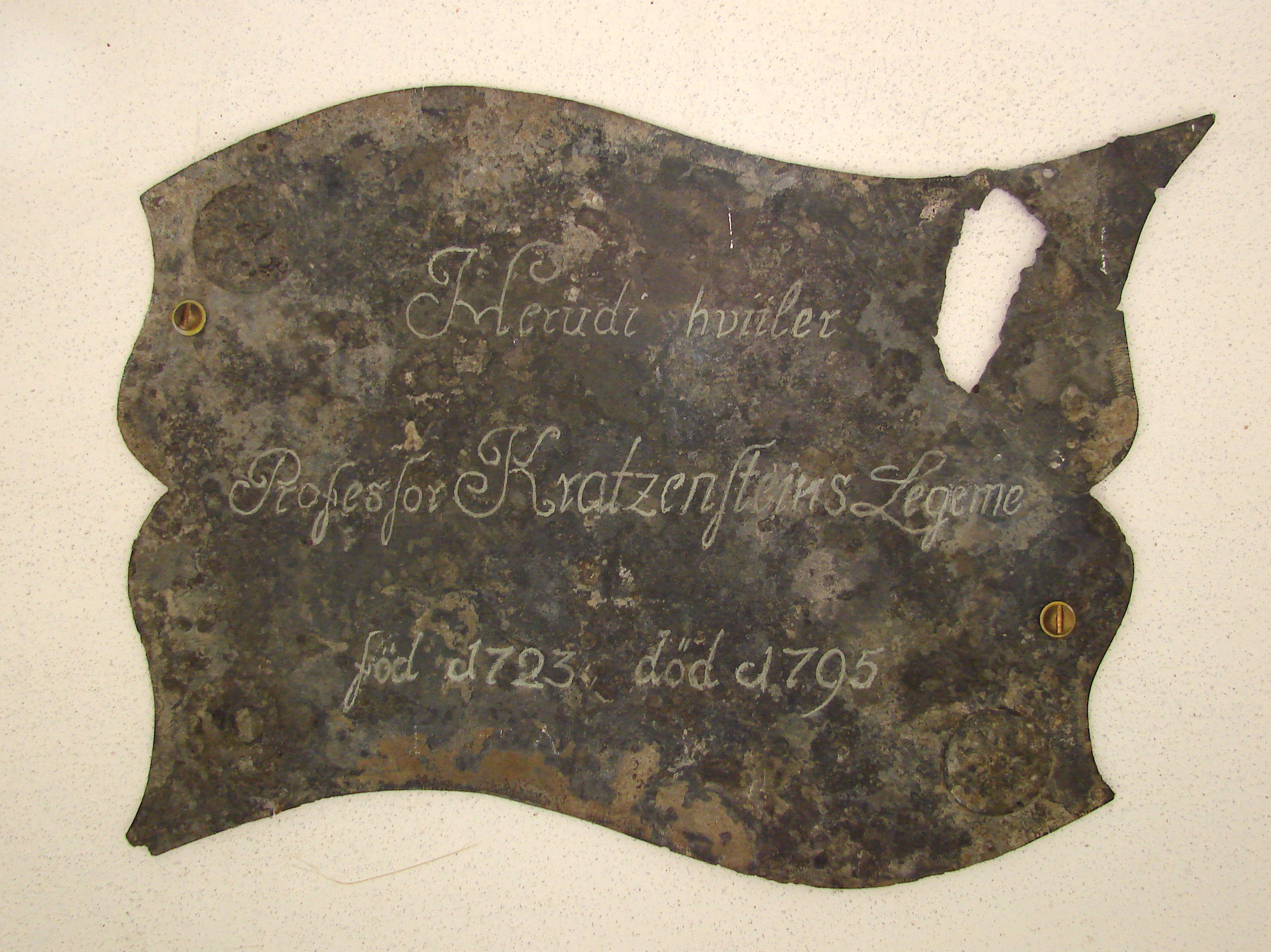 Herudi hviiler Professor Kratzensteins Legeme föd 1723 död 1795, mindeplade fra Sankt Petri Kirkes gravkapeller, København